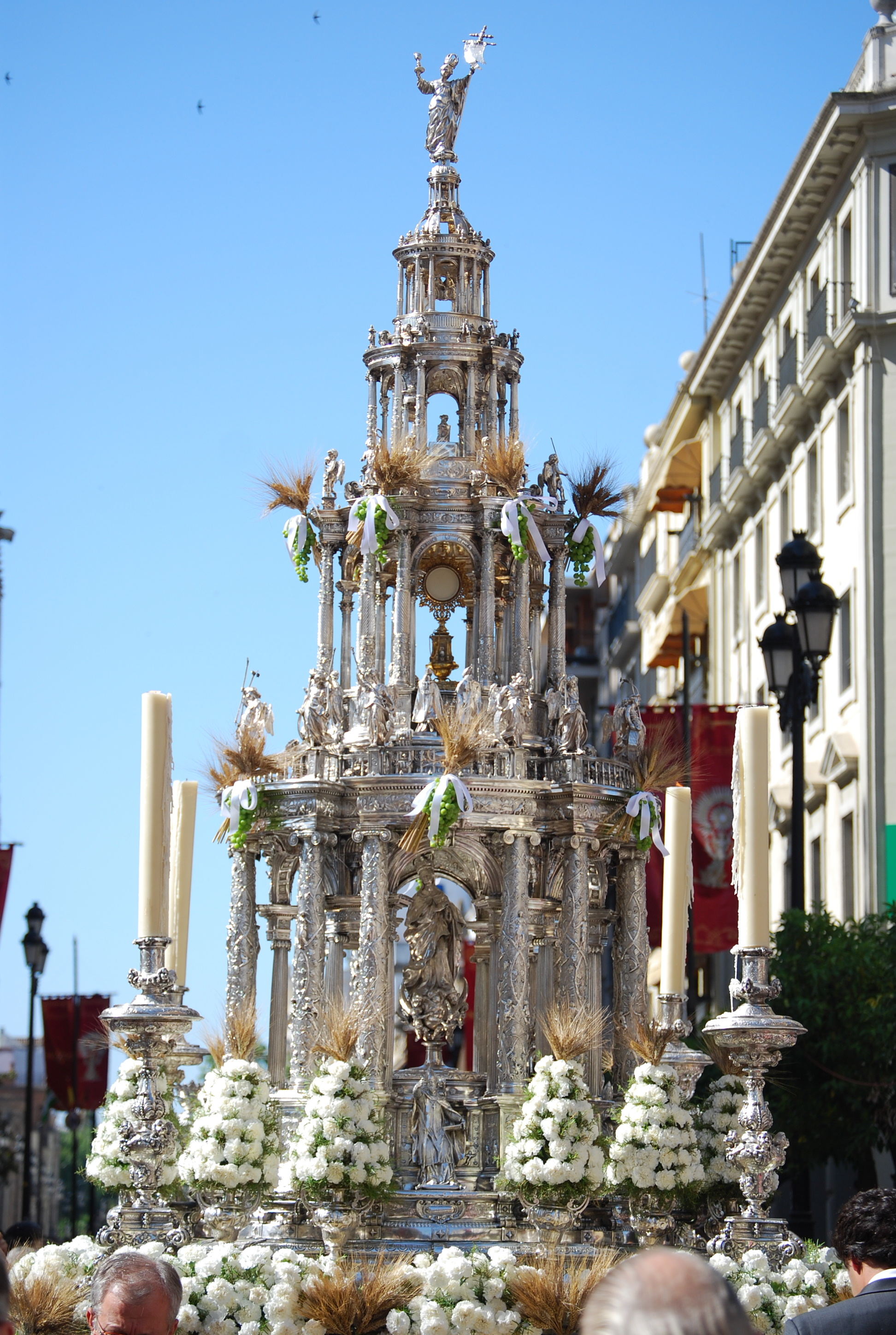 Custodia procesional de la catedral de Sevilla.